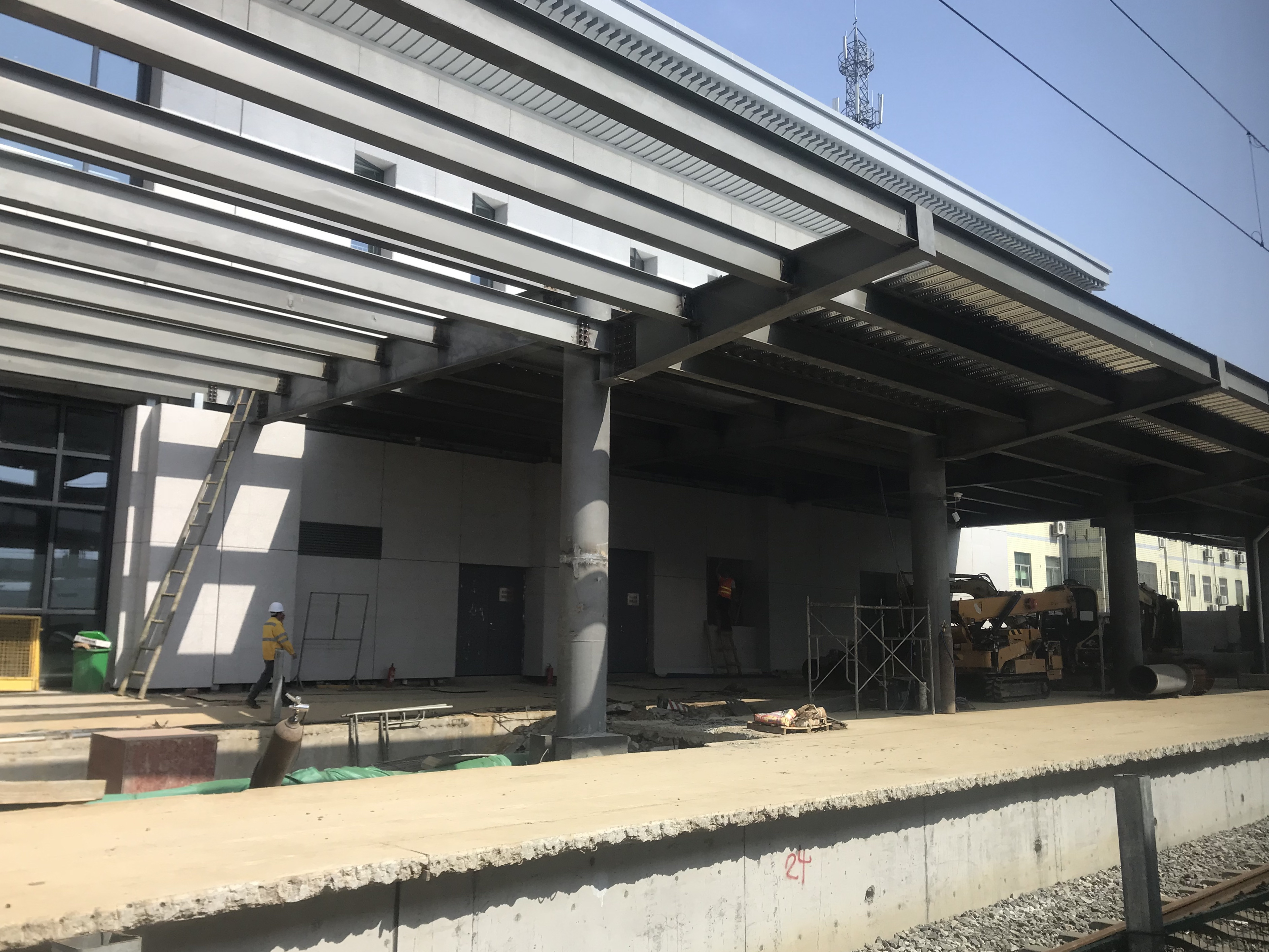 合武線の列車内より望む改修中の六安駅のホーム